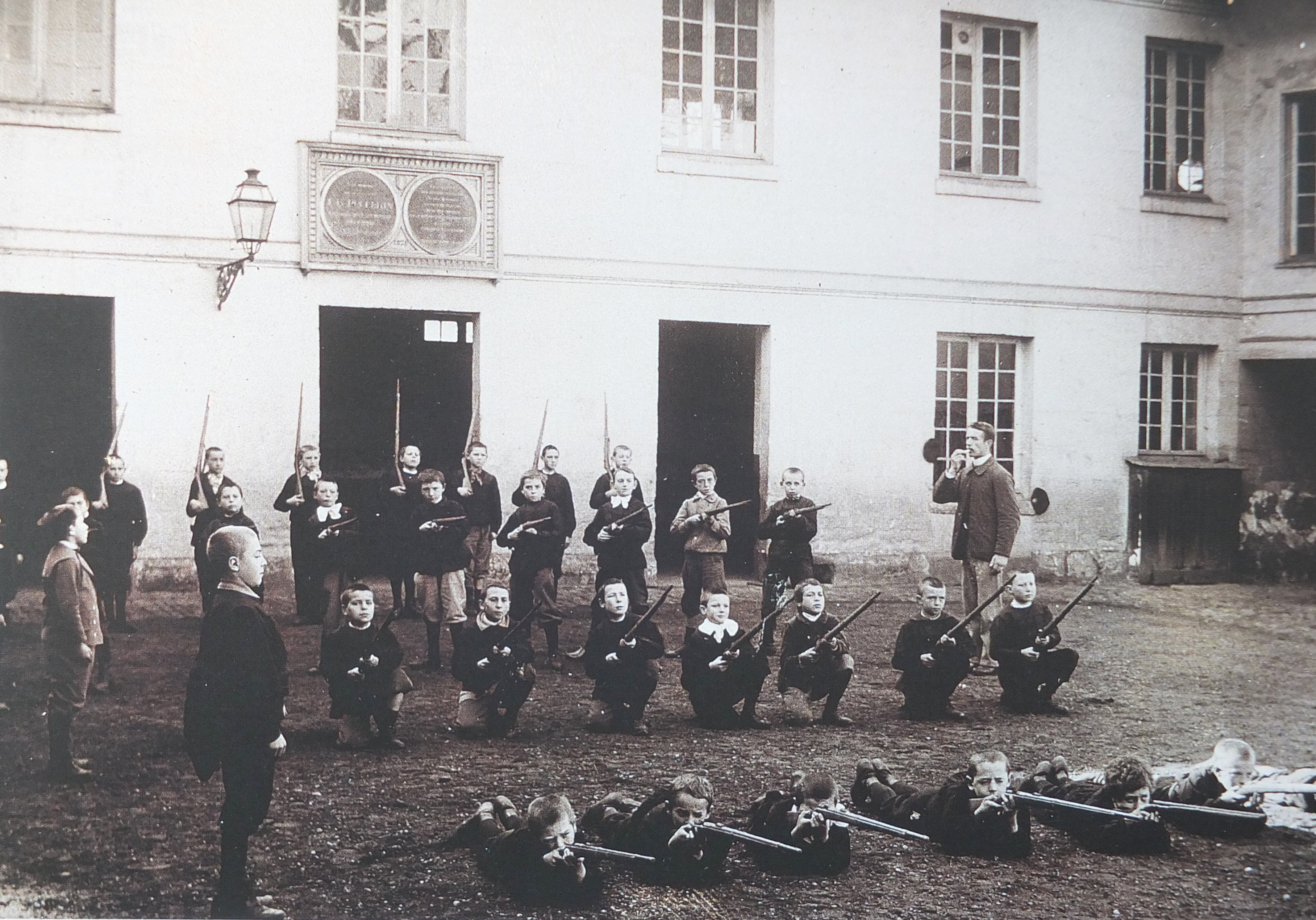 École Pellerin à Beauvais (Oise) vers 1890. Le bataillon scolaire en exercice dans la cour de récréation. Musée national de l'Éducation, Rouen.